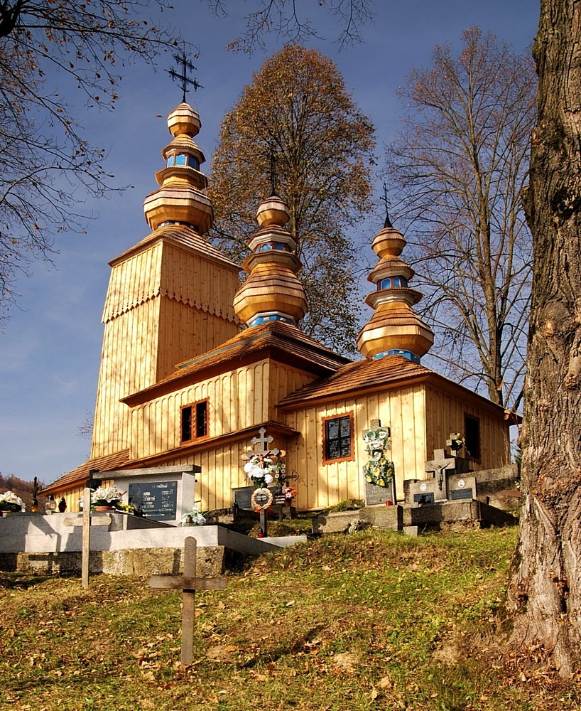 wieś Hunkovce